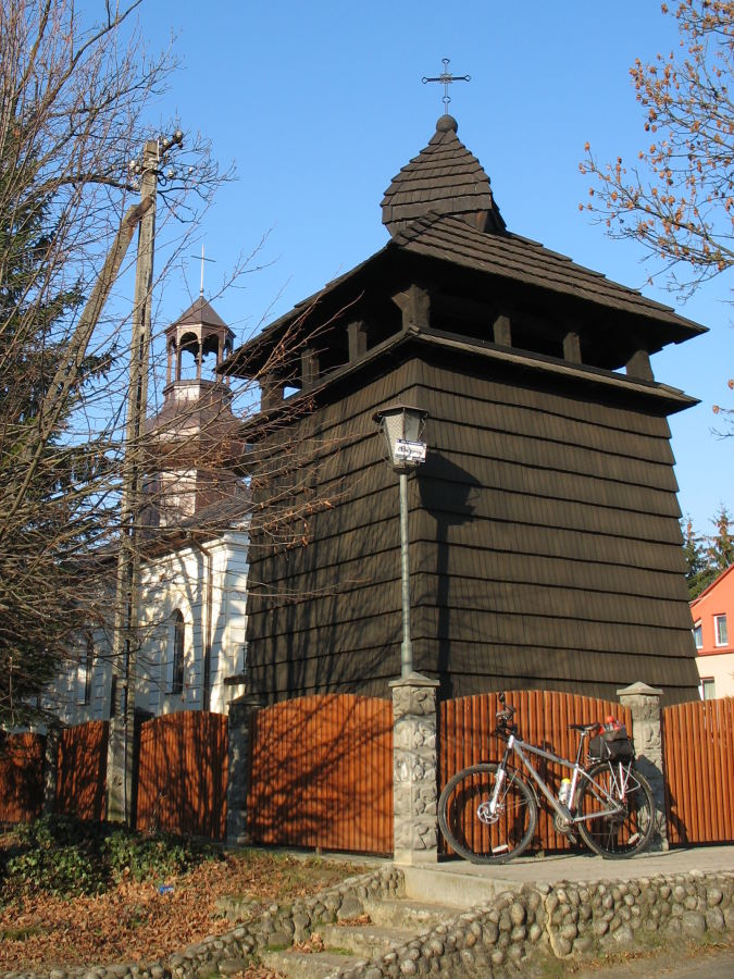 Prałkowce (Poland), belfry Dzwonnica w Prałkowcach z kończ XVI w. (rekonstrukcja)